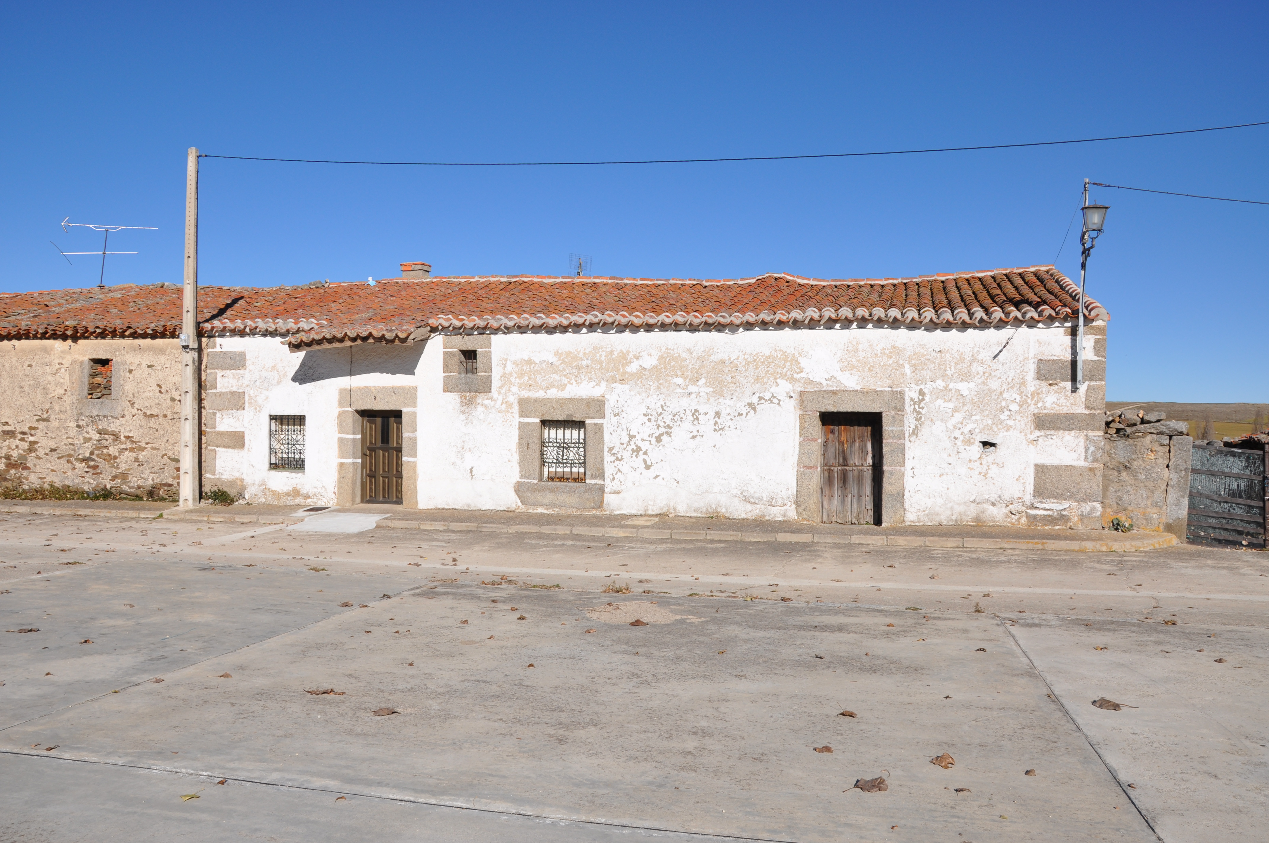 Casa en Gallegos de Sobrinos, Ávila, España.